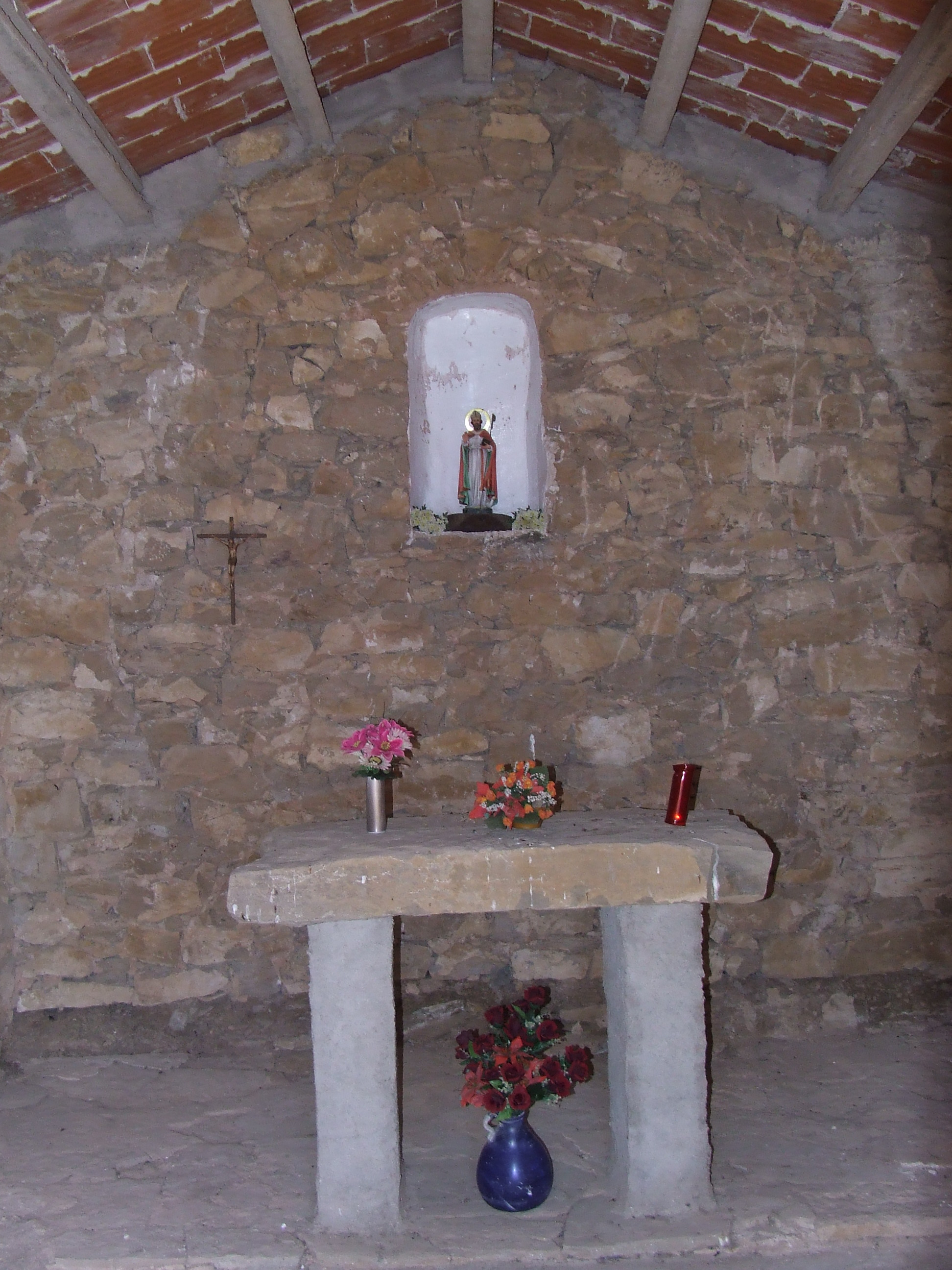 La Mare de Déu del Roser de Puigmaçana (Mur, Castell de Mur, Pallars Jussà)